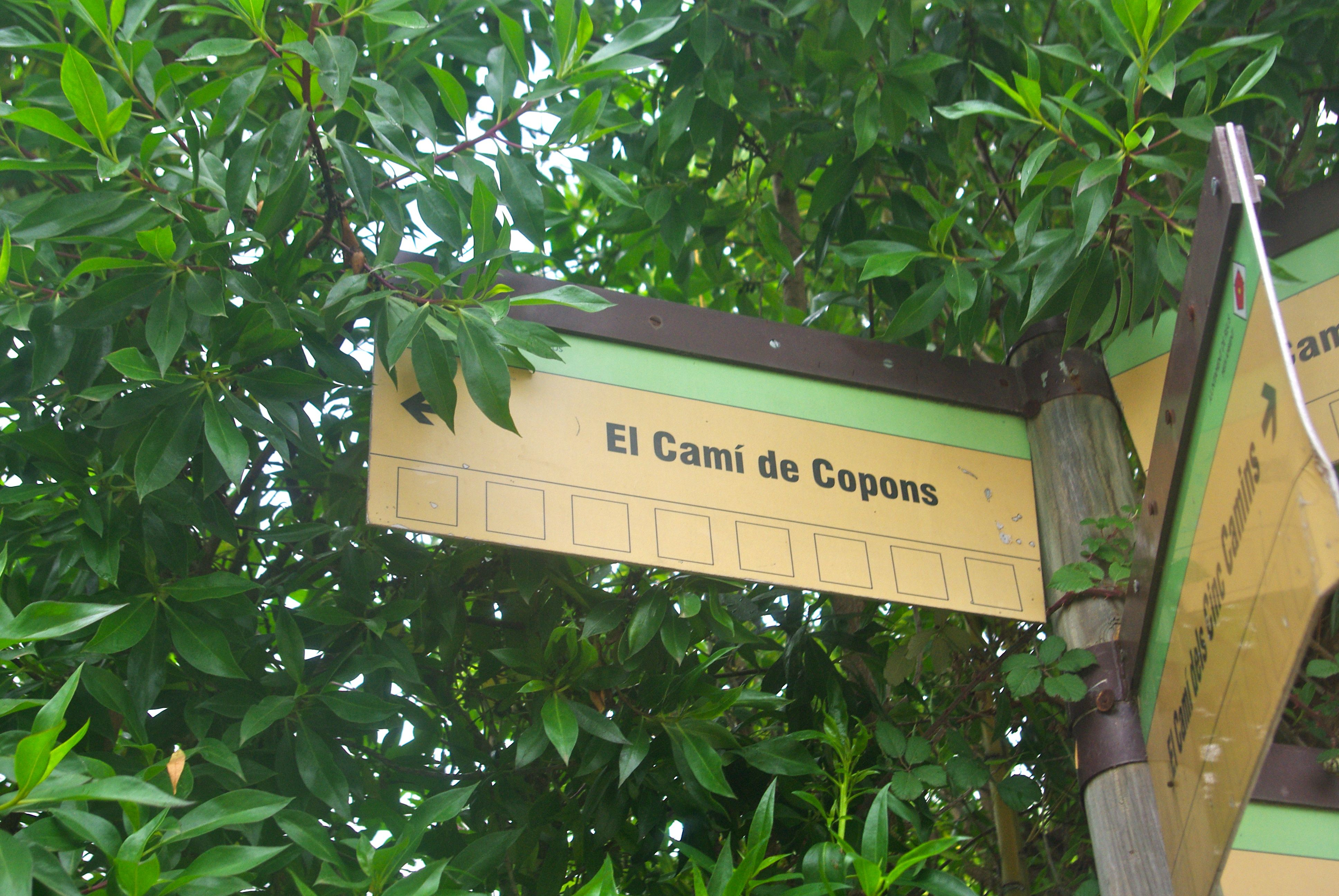 Cartell que assenyala el Camí de Copons, al terme de Reus